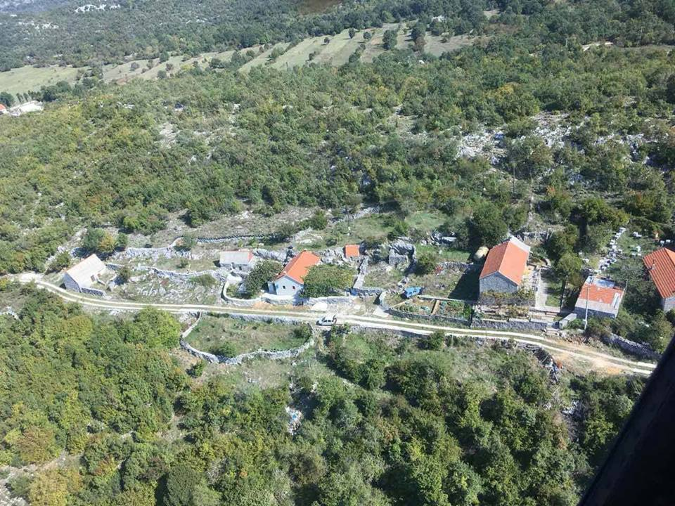 Село Требијови